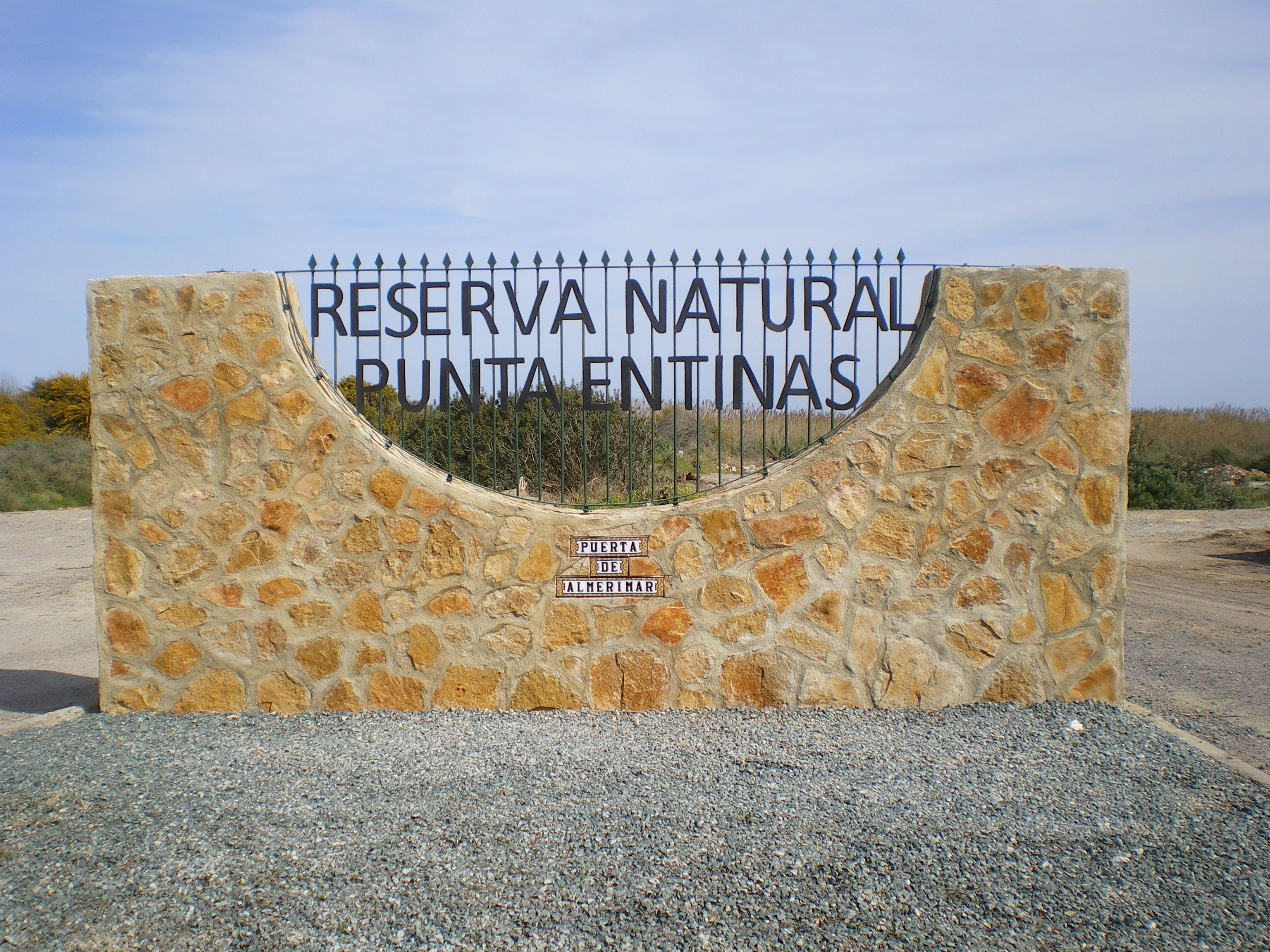 Fotografía del portón de entrada a la Reserva de Punta Entinas por Almerimar, El Ejido, Almería, España, obra promovida por la Fundación Punta Entinas-Sabinar e Isla de Alborán.